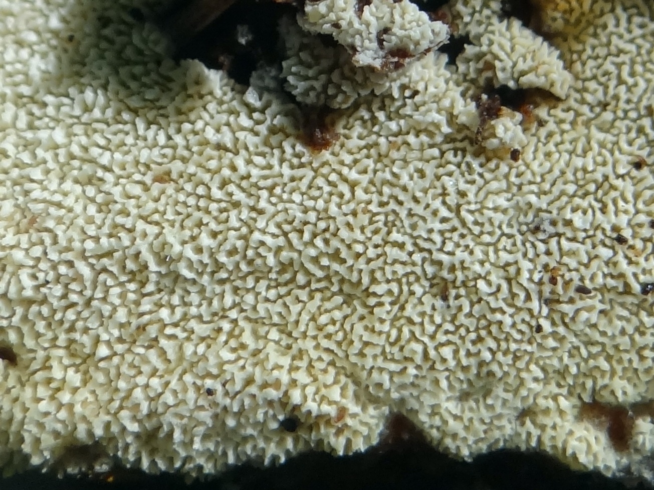 Ceriporia reticulata (location: Poland)